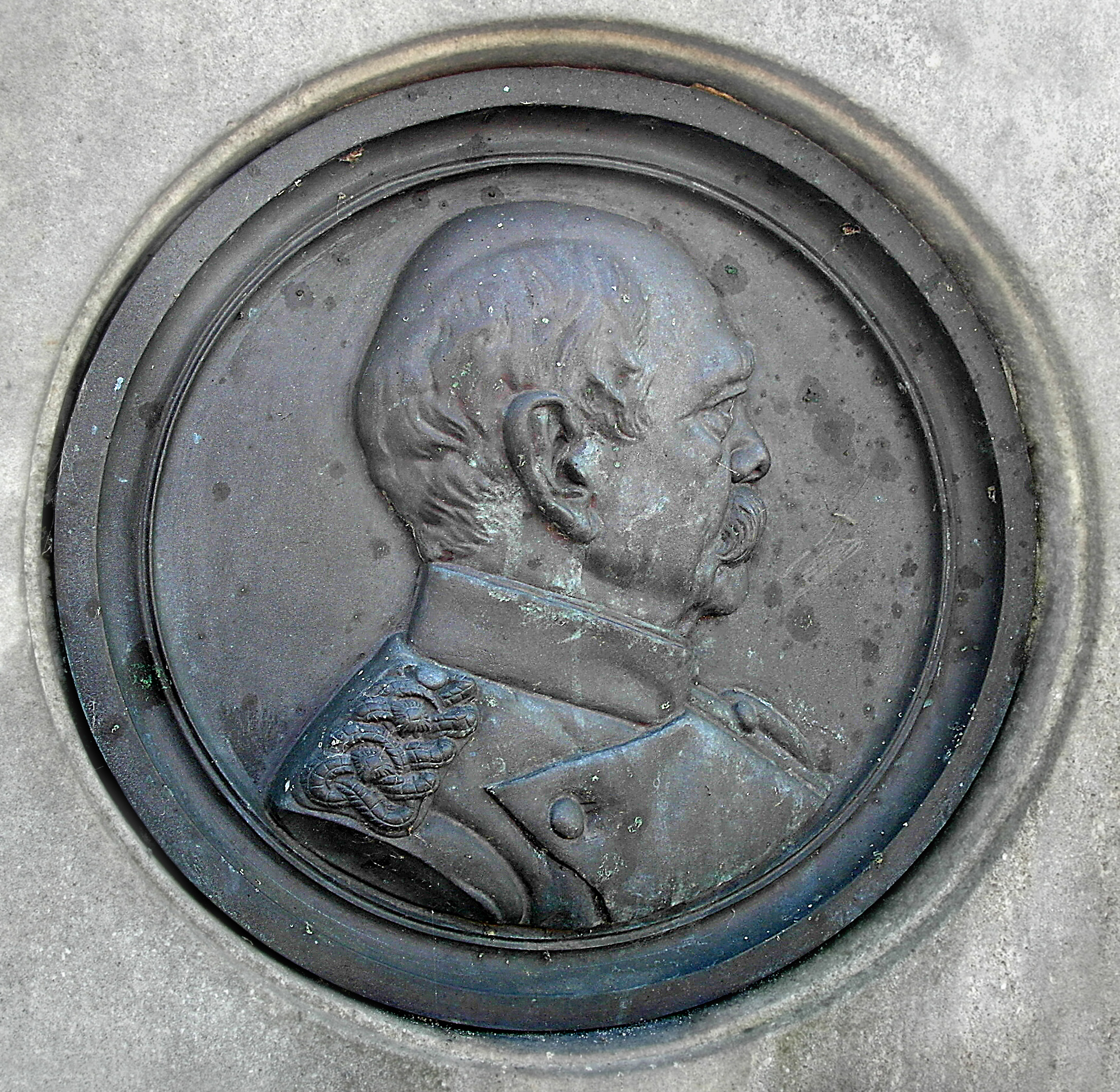 02.11.2014 01159 Dresden-Löbtau: Das gußeiserne Bismarck-Medaillon an der Weißeritzbrücke von 1837. Heute ein Nachguß von 1988 aus der Kunstgießerei Lauchhammer. [SAM7087.JPG]20141102200DR.JPG(c)Blobelt